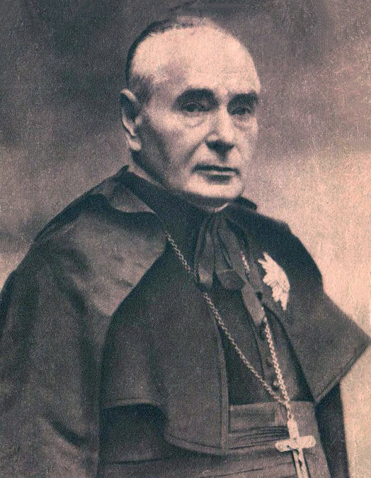 Csernoch János Magyarország bíboros-hercegprímása